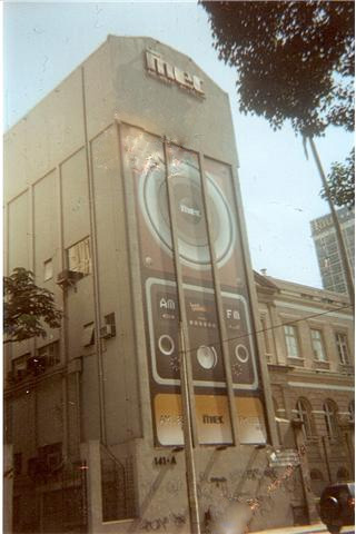 A fachada da estação de rádio brasileira Rádio MEC localizada na cidade do Rio de Janeiro